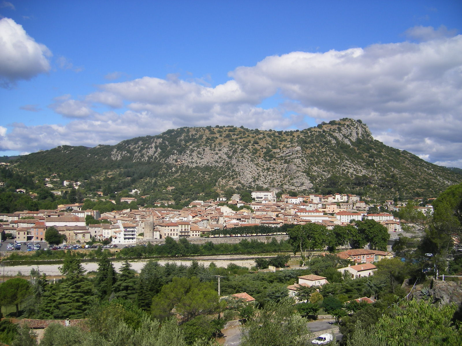 Anduze